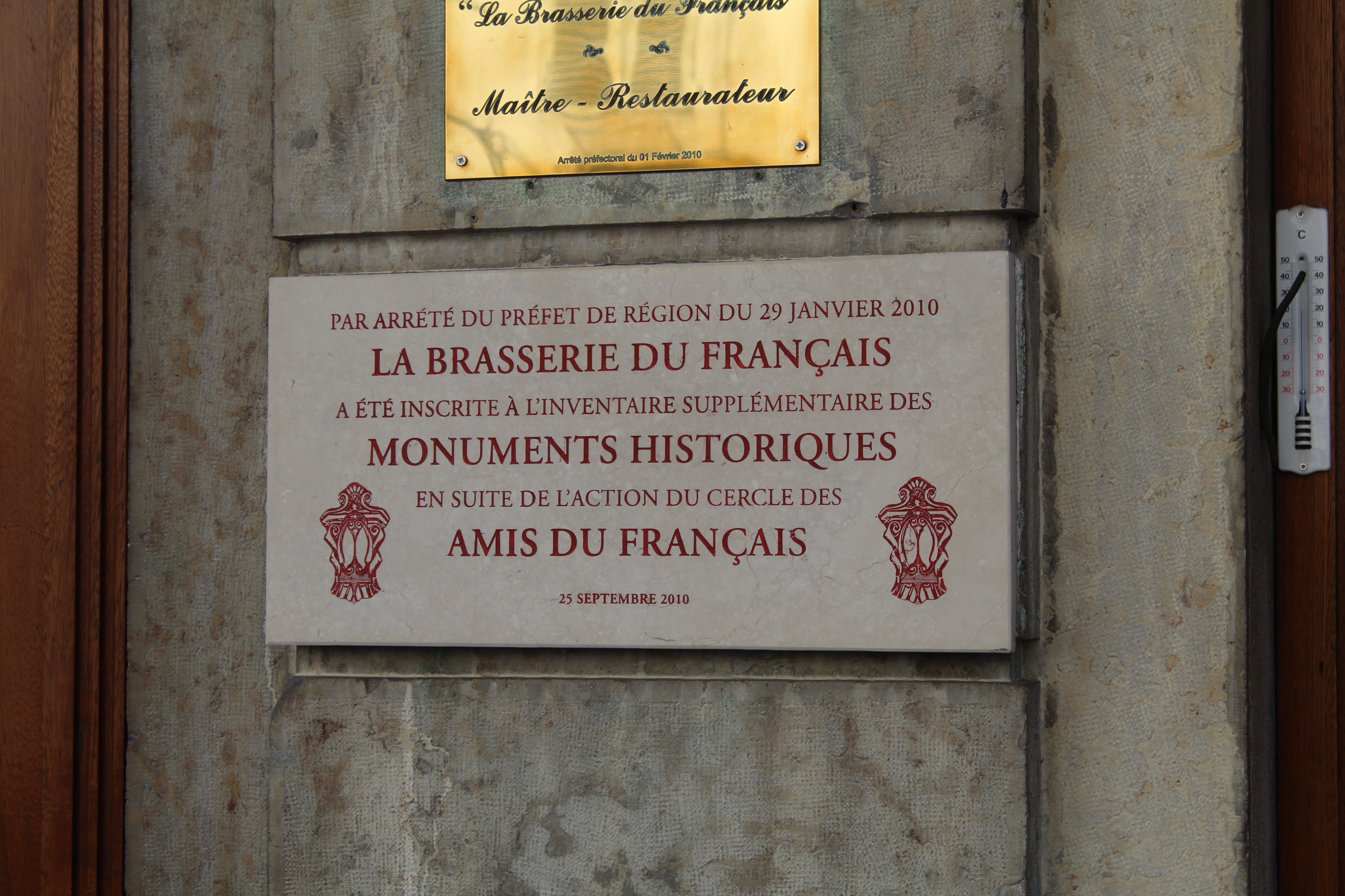 Plaque au Café français à Bourg-en-Bresse.